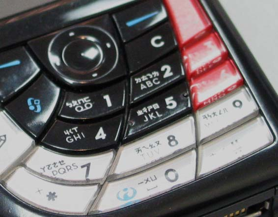 Image:Zhuyin_on_cell_phone_detail.jpg